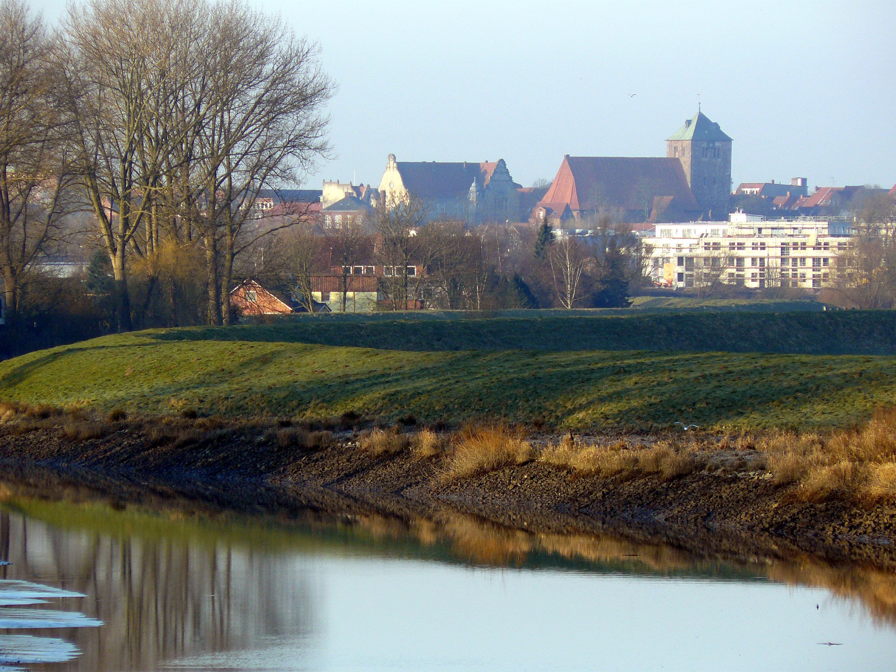 Unterlauf der Schwinge (Nebenfluss der Elbe) bei Niedrigwasser im Frühjahr 2009; im Hintergrund die Stader Altstadt mit der St. Wilhadi-Kirche.